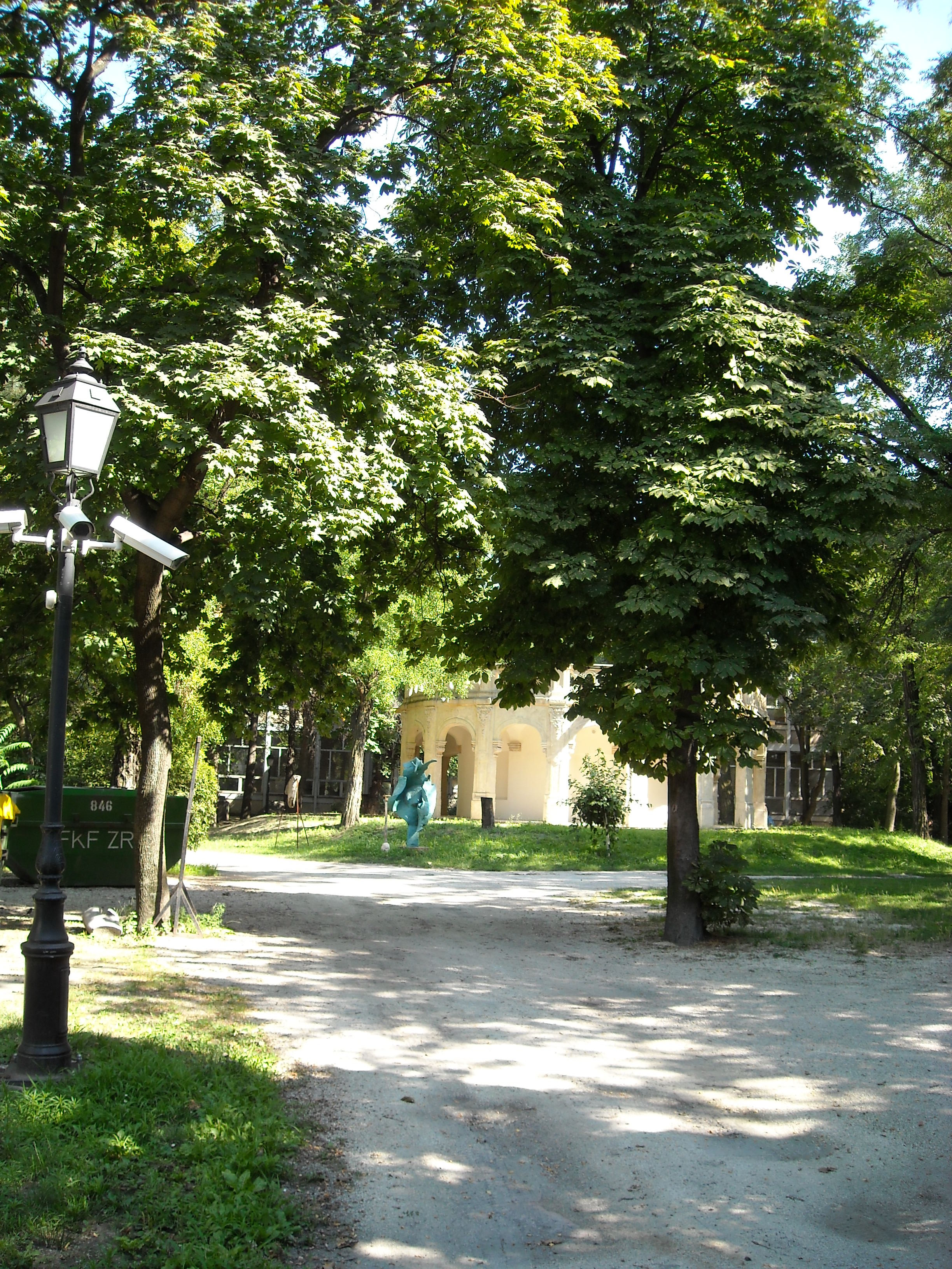 Epreskert, Budapest, Bajza utca, 41 a régi kálvária felé nézve